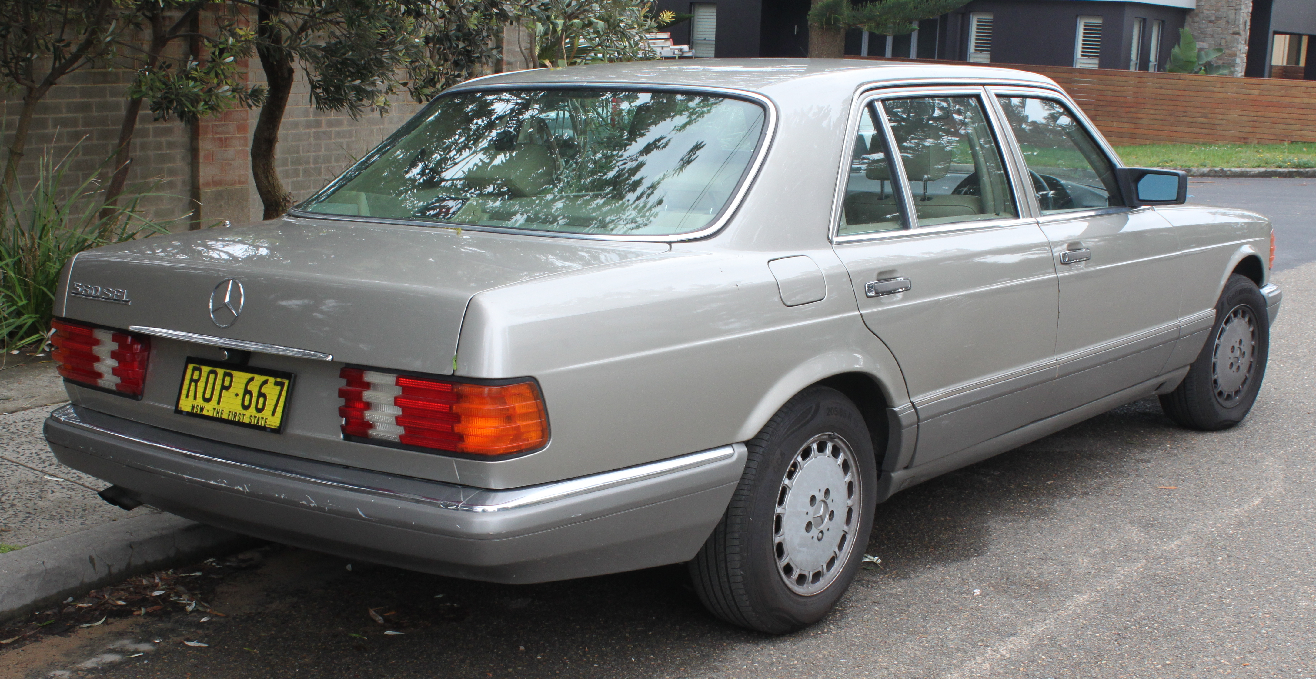 Mercedes Benz W126 560SEL